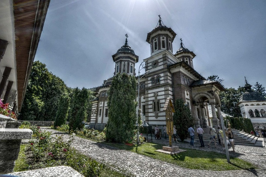 Manastirea Sinaia, iulie 2012